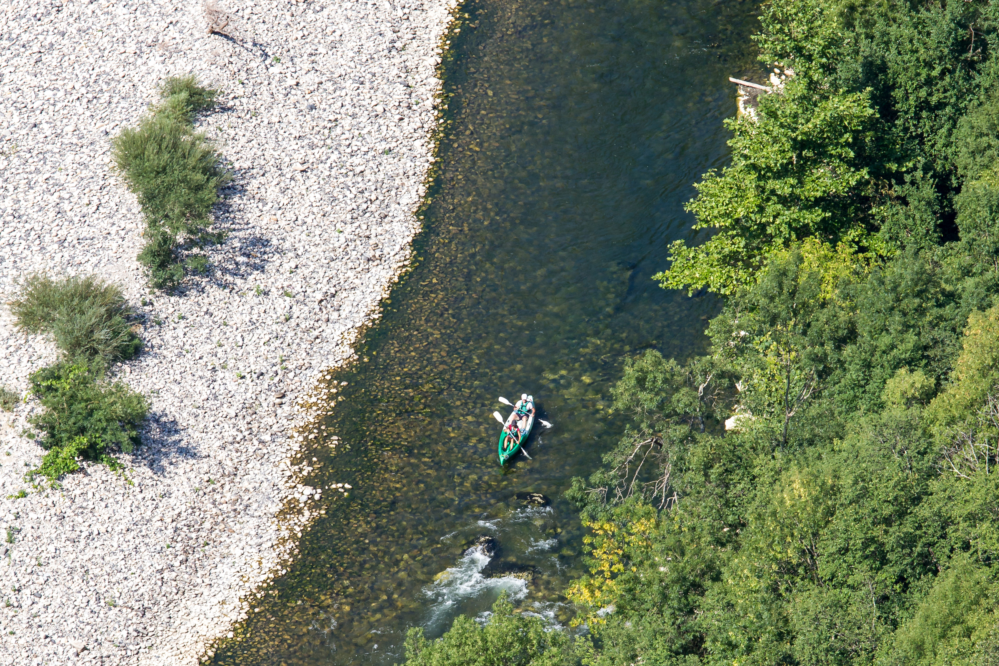 Blick in die Schlucht der 'Ardèche